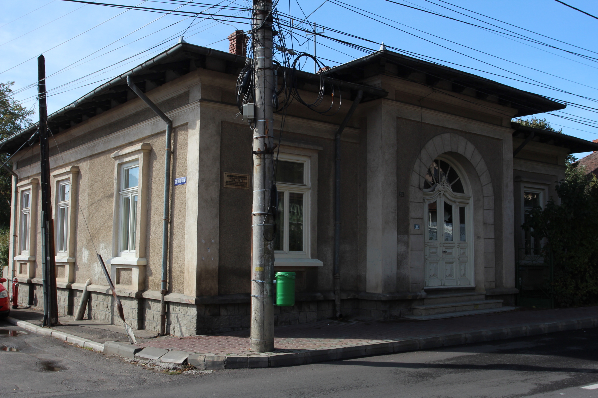 Casa Elenei Cuza